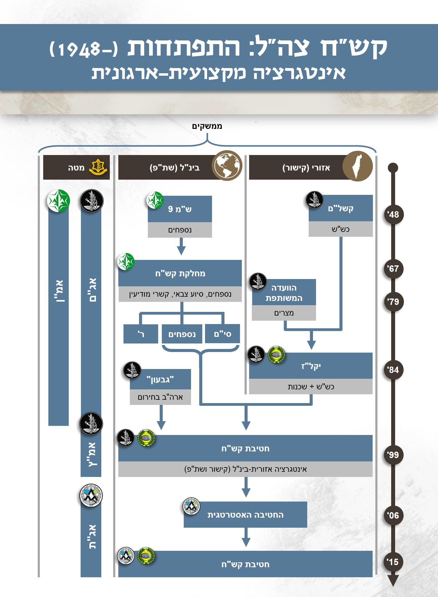 התפתחות ארגונית היסטורית של חטיבת קשרי החוץ של צה"ל